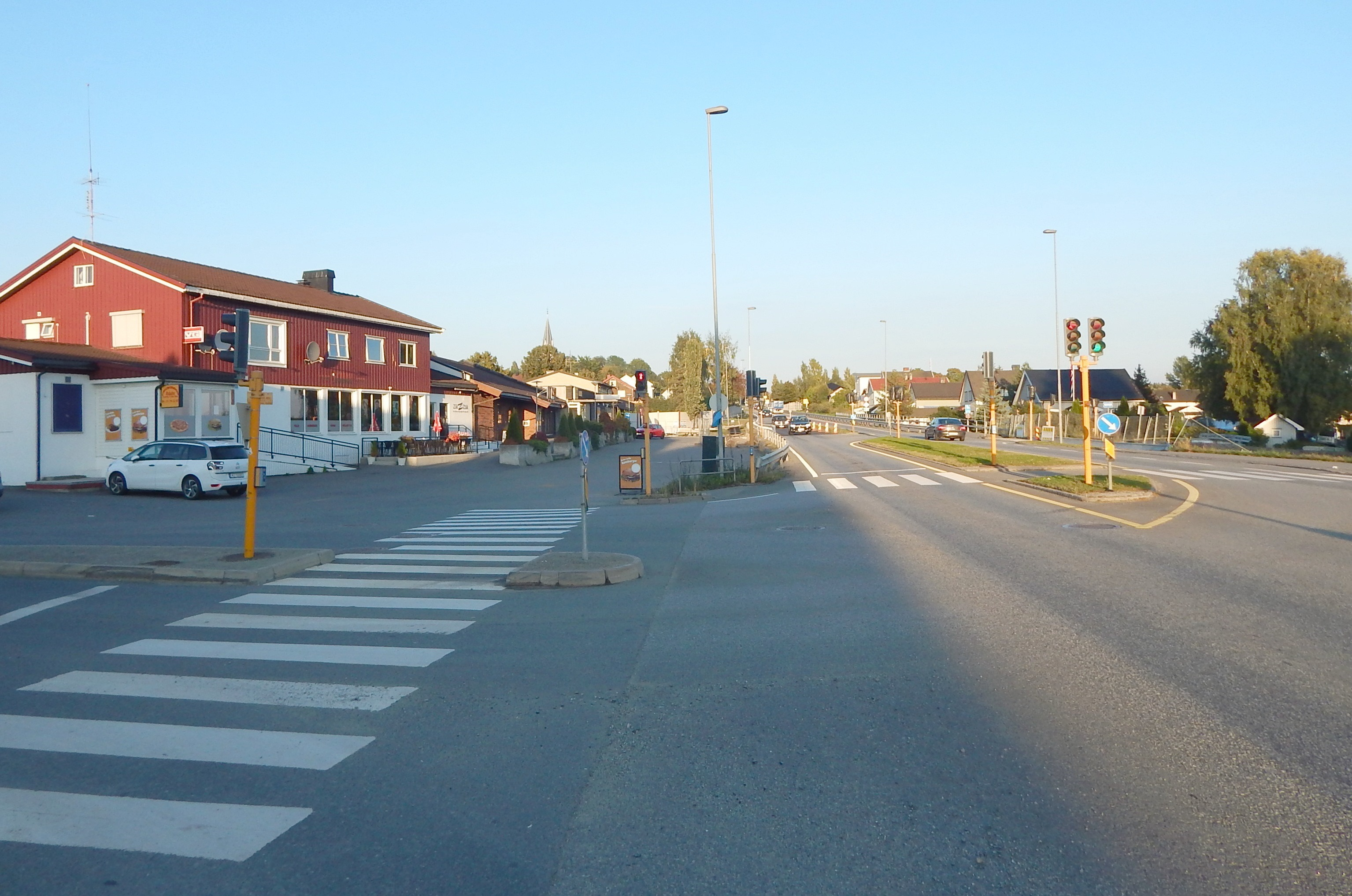 Riksvei 25 ved Ridabu i Vang